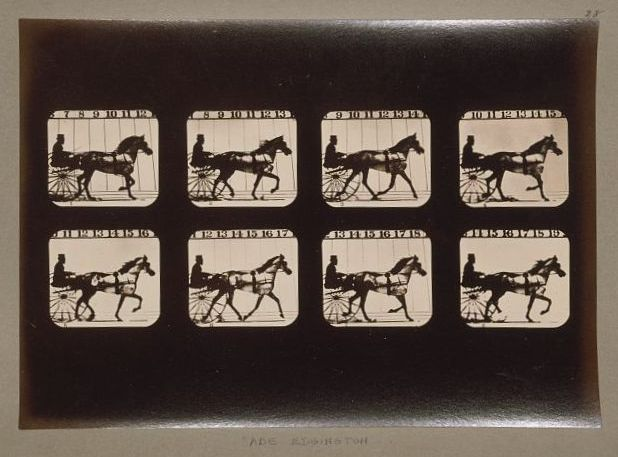 "Abe Edgington" Series.